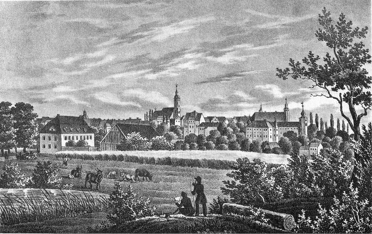 Historische Ansicht von Glauchau in Sachsen. Stahlstich.